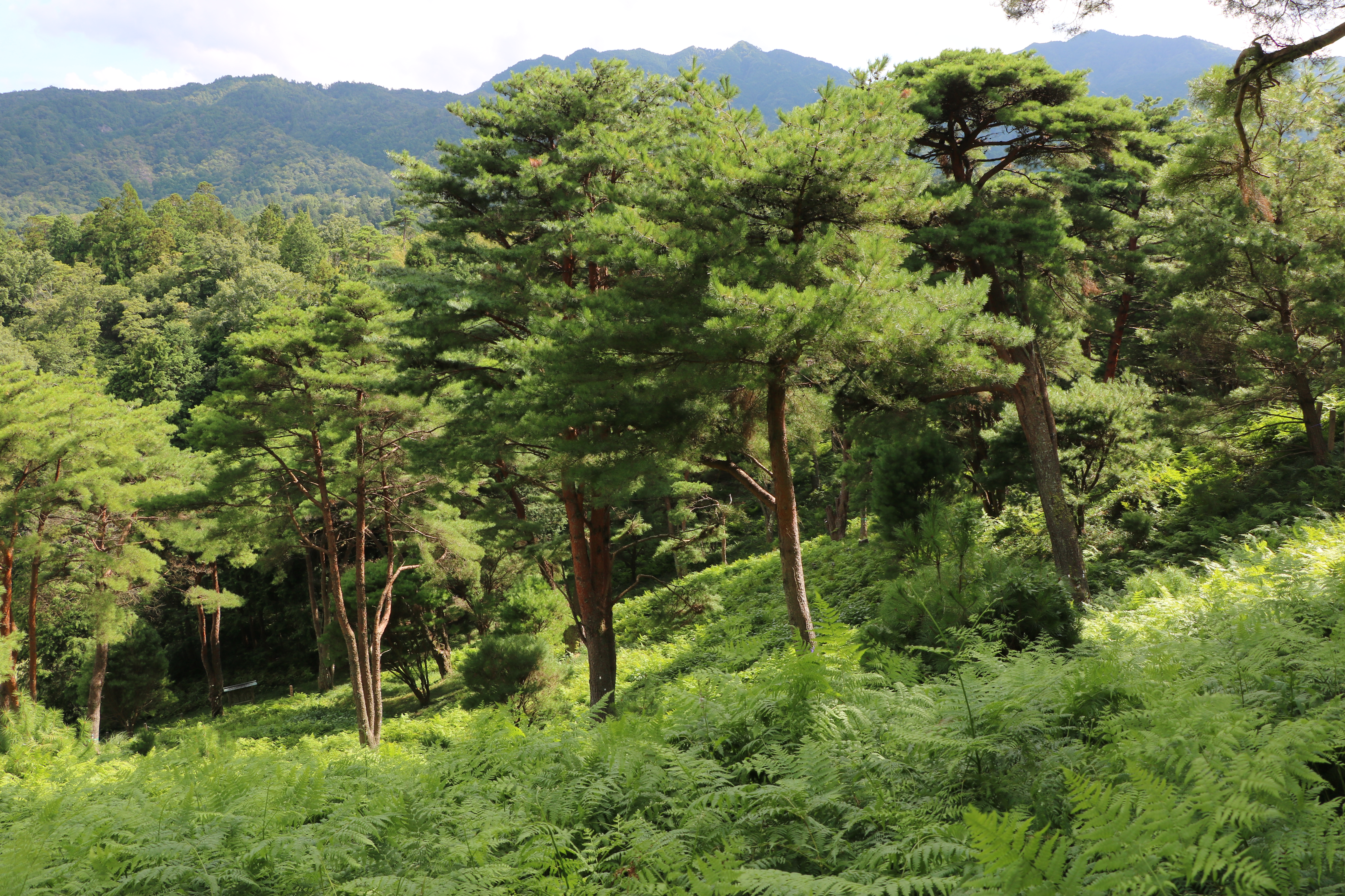 平松のウツクシマツ自生地（国指定天然記念物、滋賀県湖南市）